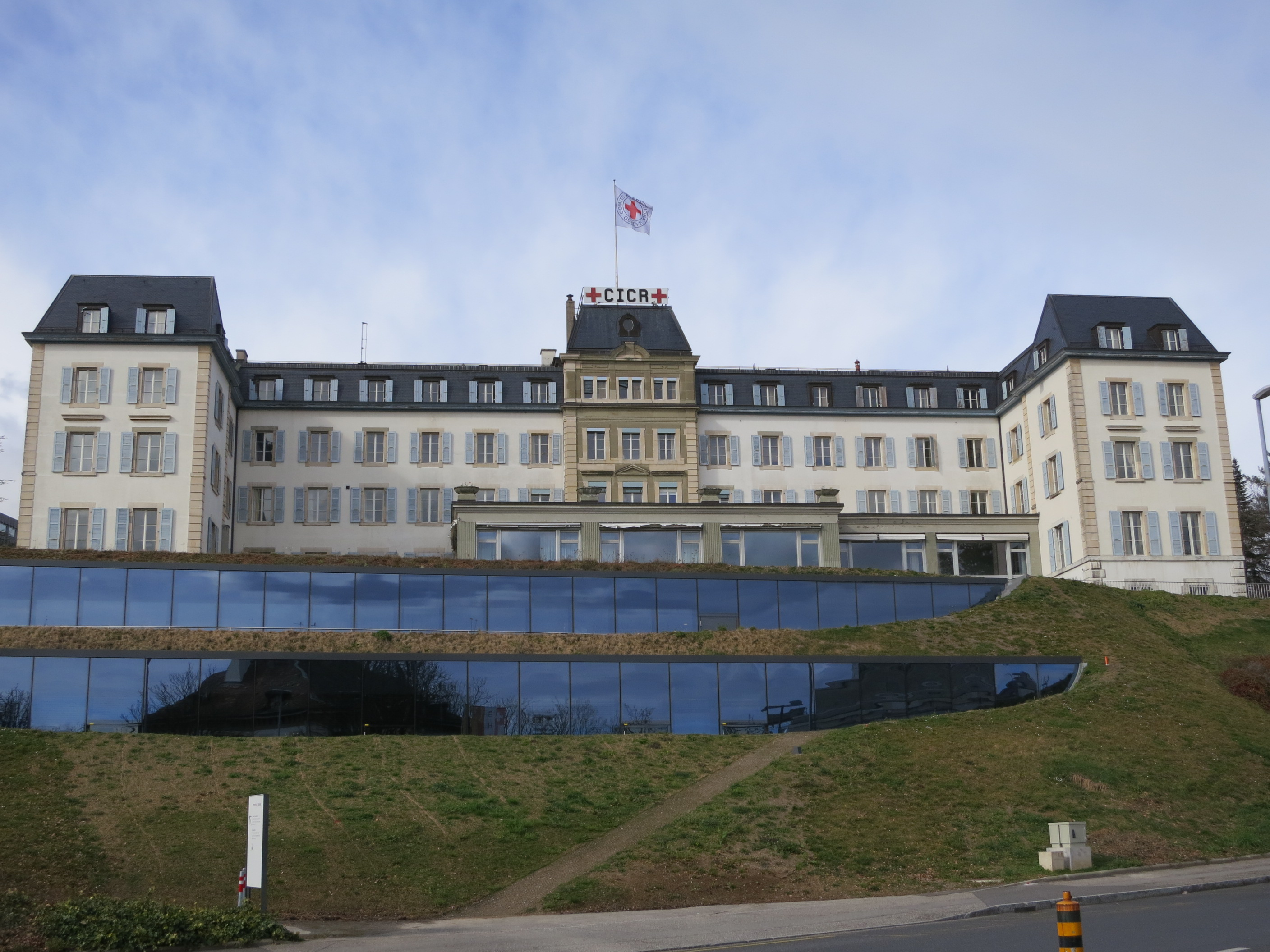 IKRK Hauptsitz, Genf, Schweiz